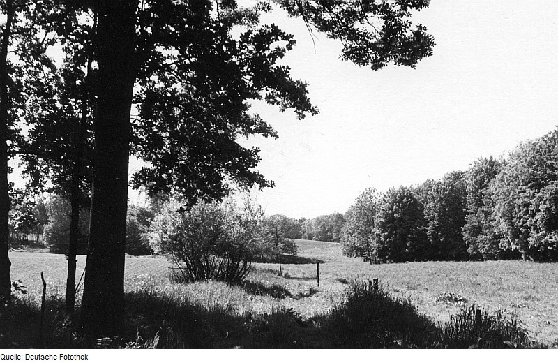 Original image description from the Deutsche FotothekKlipphausen-Lampersdorf. Tal der Kleinen Triebisch zwischen Lampersdorf und Taubenheim